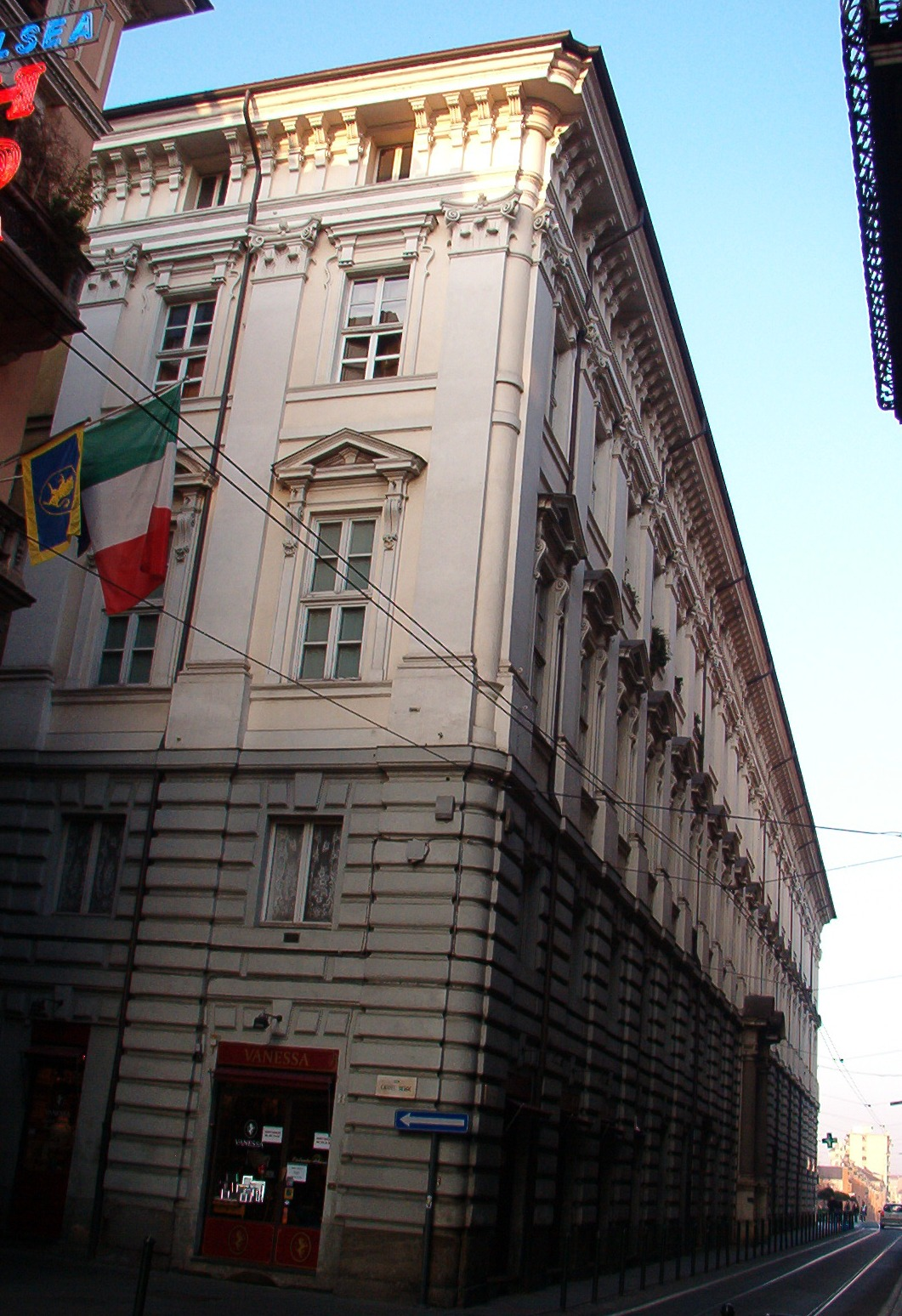 Palazzo del Seminario - Torino - Italy